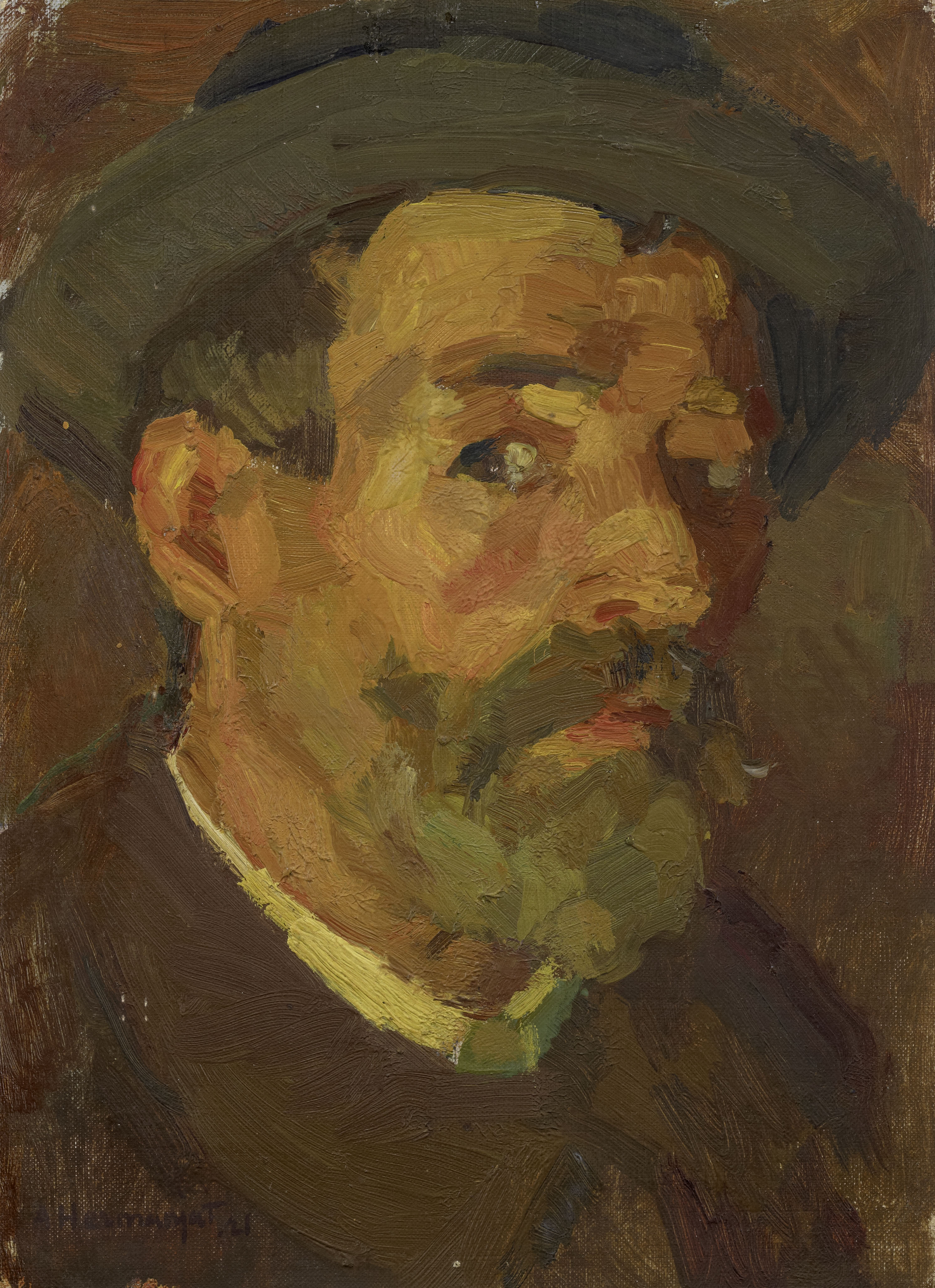 Abraham Hermanjat, Autoportrait, 1921, tempera sur toile, 28,1 x 20,4 cm. Nyon, Fondation Abraham Hermanjat.